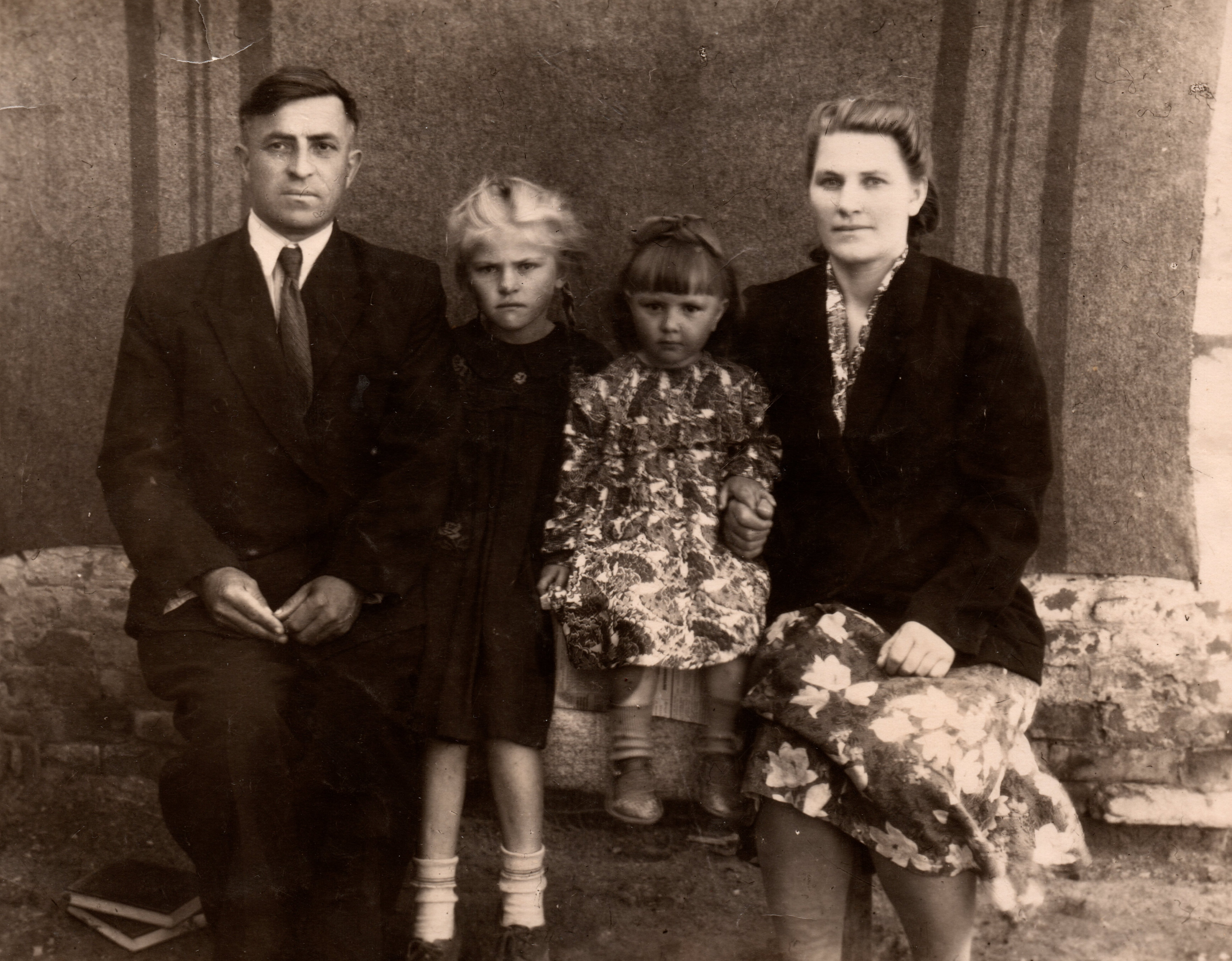 Батьки Іван Якович та Галина Григорівна, сестра Ніна